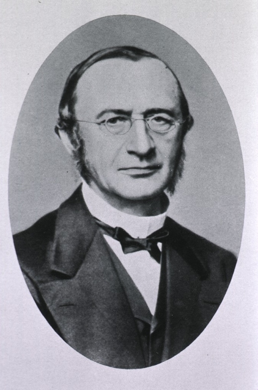 Photo - Portrait des Artztes Ludwig Buhl